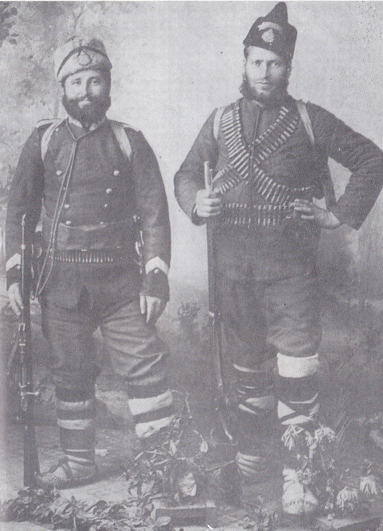 Димитър Ташев и Димо Русев.